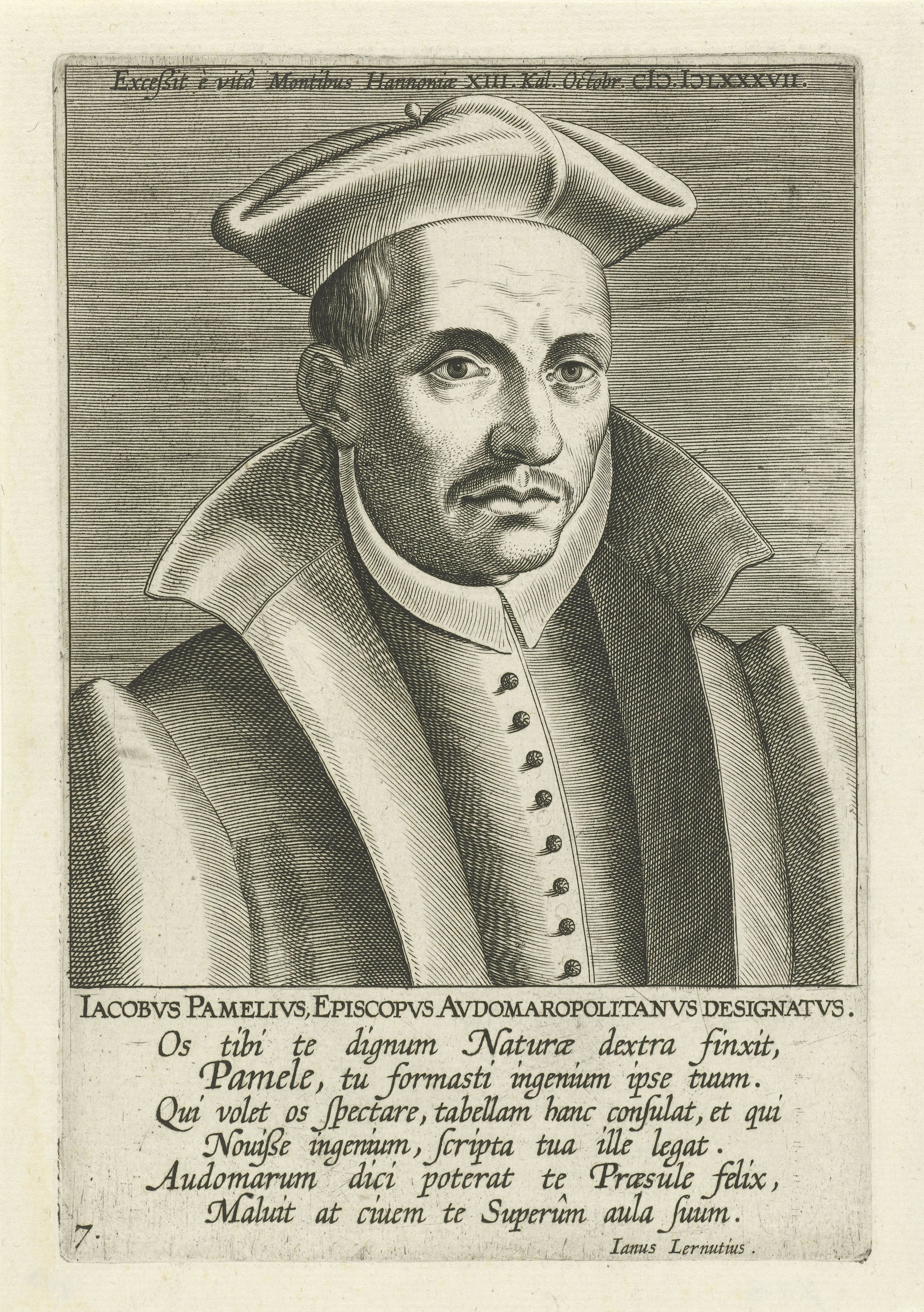 IdentificatieTitel(s): Portret van Jacob van PameleIacobvs Pamelivs (titel op object)Portretten van beroemde Nederlandse en Vlaamse geleerden (serietitel)Illustrium Galliae Belgicae scriptorum icones et elogi (serietitel)Objecttype: prent Serienummer: 7/51Objectnummer: RP-P-1912-735Catalogusreferentie: New Hollstein Dutch fig. 36-1(2)Opschriften / Merken: verzamelaarsmerk, verso midden onder, gestempeld: Lugt 2228Omschrijving: Portret van Jacob van Pamele, Theoloog uit Brugge. Buste naar rechts. De prent heeft een Latijns boven- en onderschrift en maakt deel uit van een serie van beroemde Nederlandse en Vlaamse geleerden.VervaardigingVervaardiger: prentmaker: Philips Galle (toegeschreven aan atelier van)schrijver: Janus Lernutius (vermeld op object)uitgever: Philips Galle (mogelijk)uitgever: Theodoor Galle (mogelijk)Plaats vervaardiging: AntwerpenDatering: 1604 - 1608Fysieke kenmerken: gravureMateriaal: papier Techniek: graveren (drukprocedé)Afmetingen: plaatrand: h 158 mm × b 106 mmOnderwerpWie: Jacob van PameleVerwerving en rechtenCredit line: Schenking van de heer J.J. de Graaf, HaarlemVerwerving: schenking 1912Copyright: Publiek domein